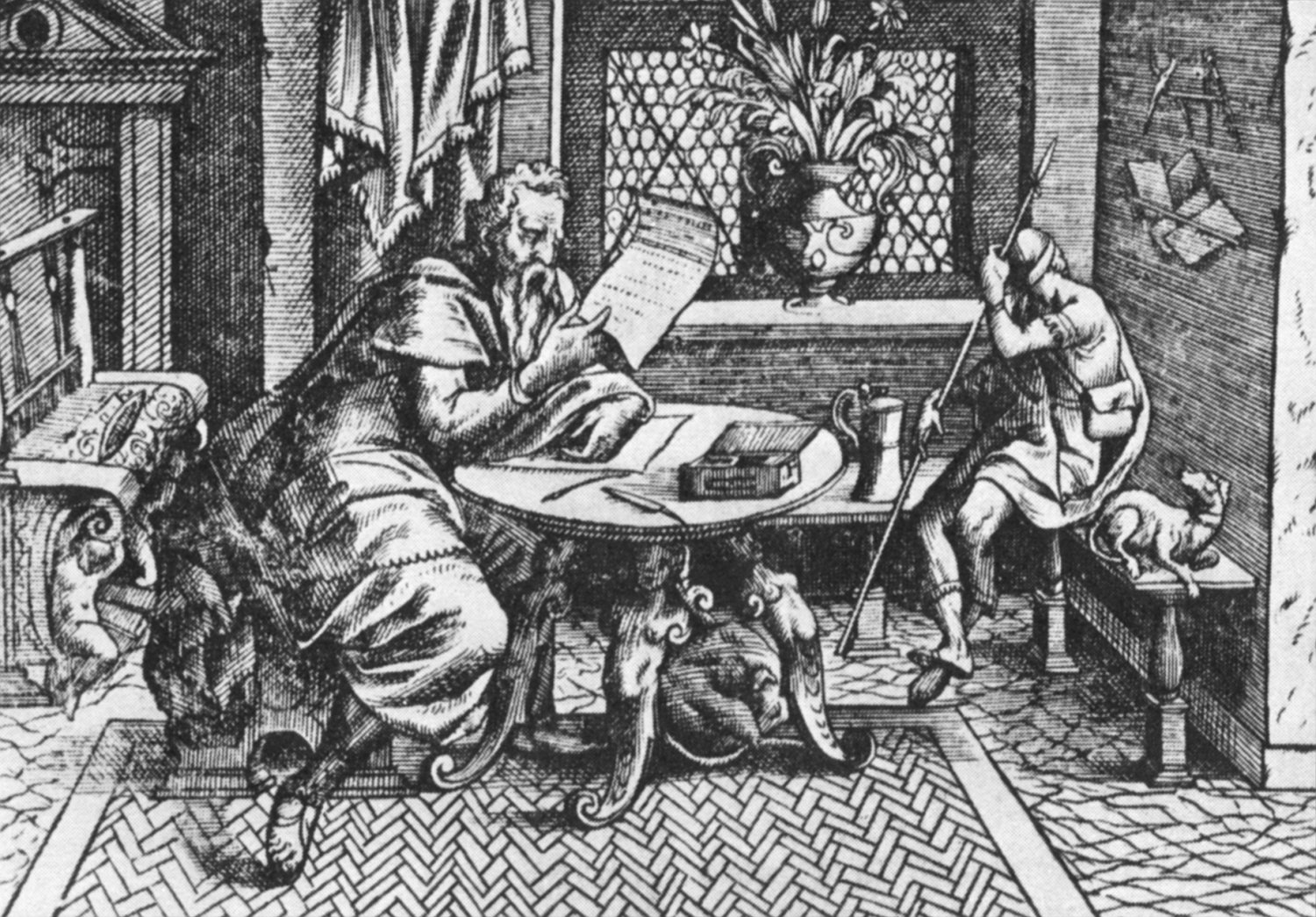 Apoštol Pavel píšící epištolu (?), dřevořez z Bible Melantrichovy